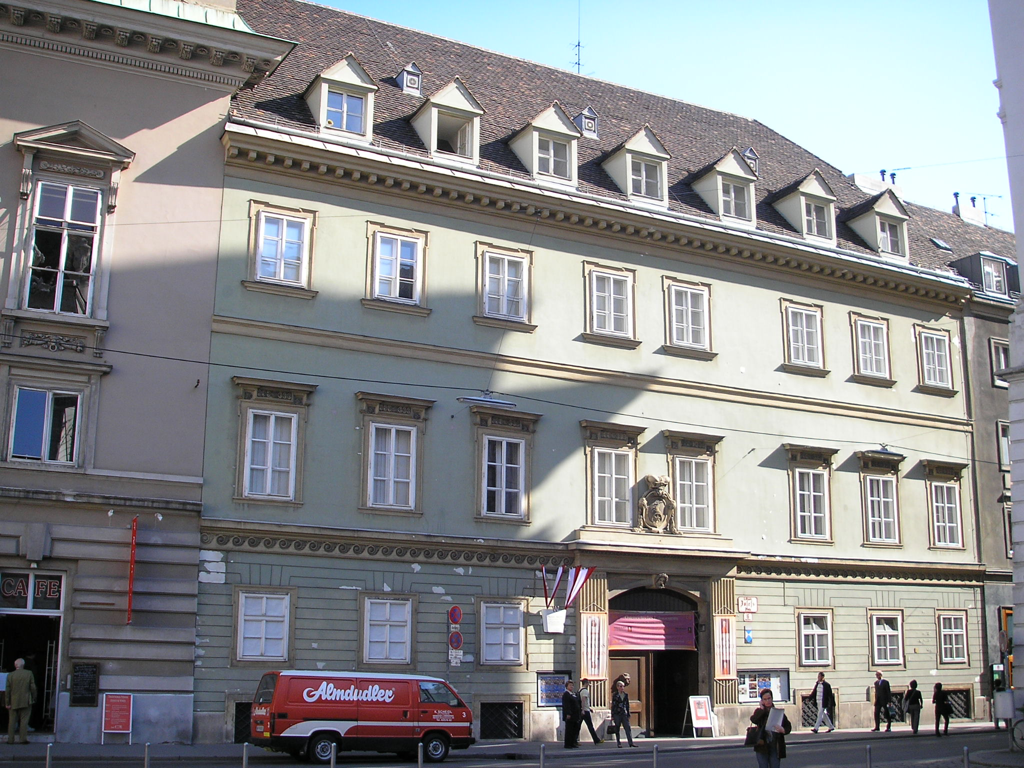 Palais Pálffy in Vienna, Josefplatz square.